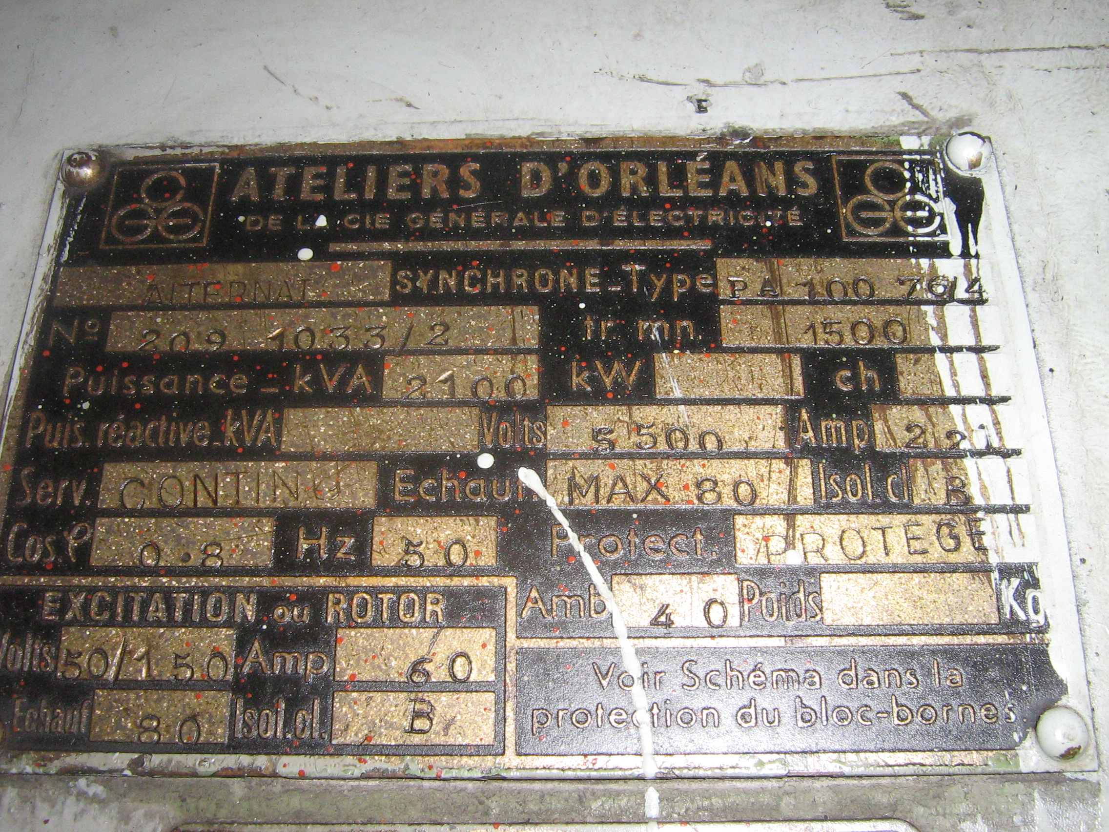 Description de la plaque du groupe électrogène de 2,1 MVA. Alimentation électrique du métro de Paris.